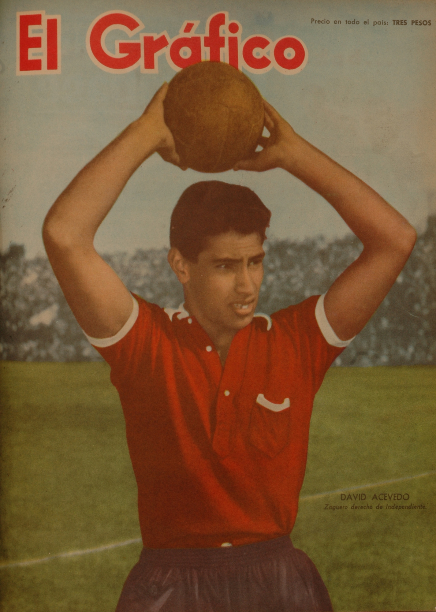 El Grafico del 23 de Mayo de 1958. Edicion 2019